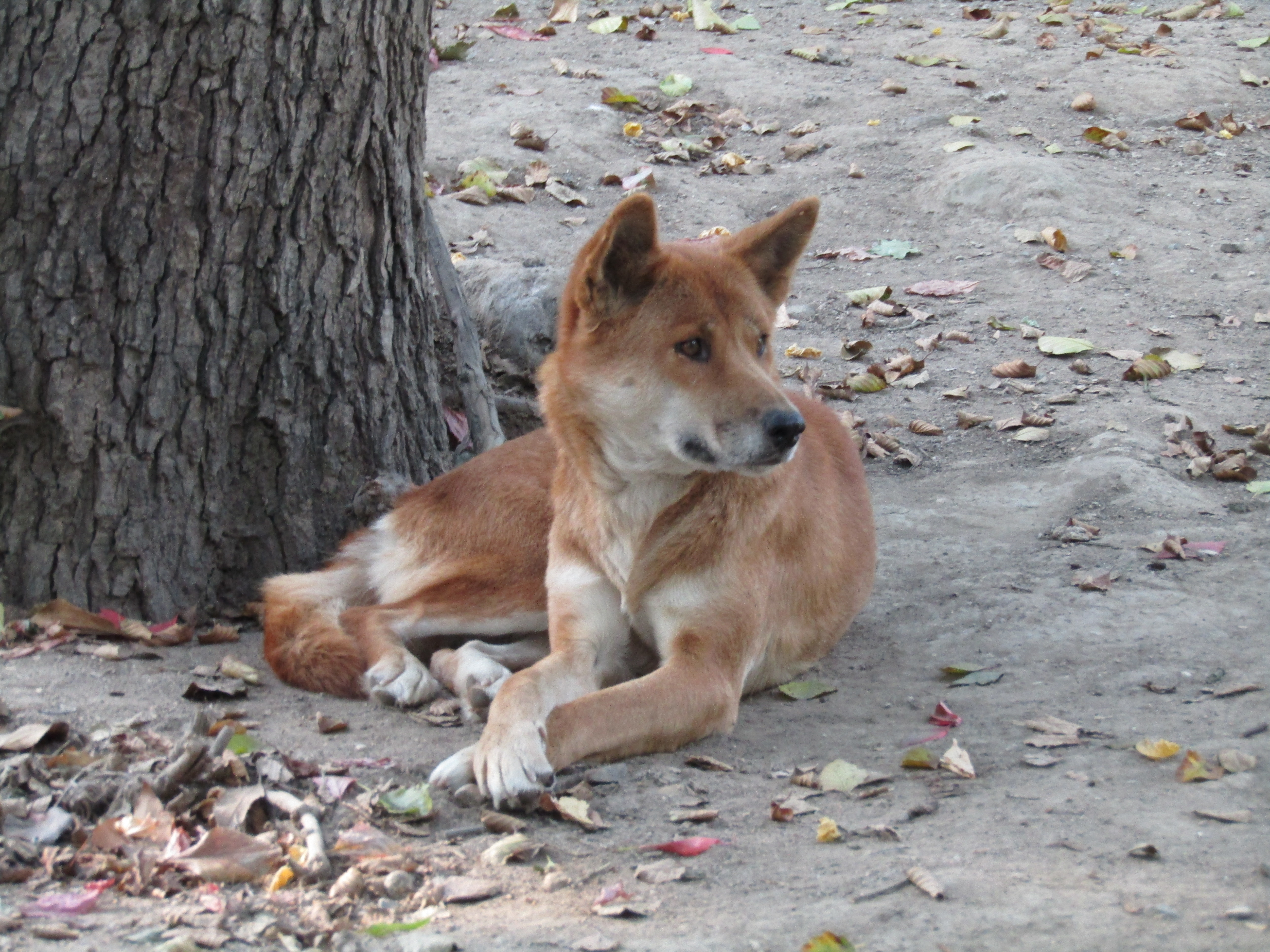 Dingo v Zoo Plzeň